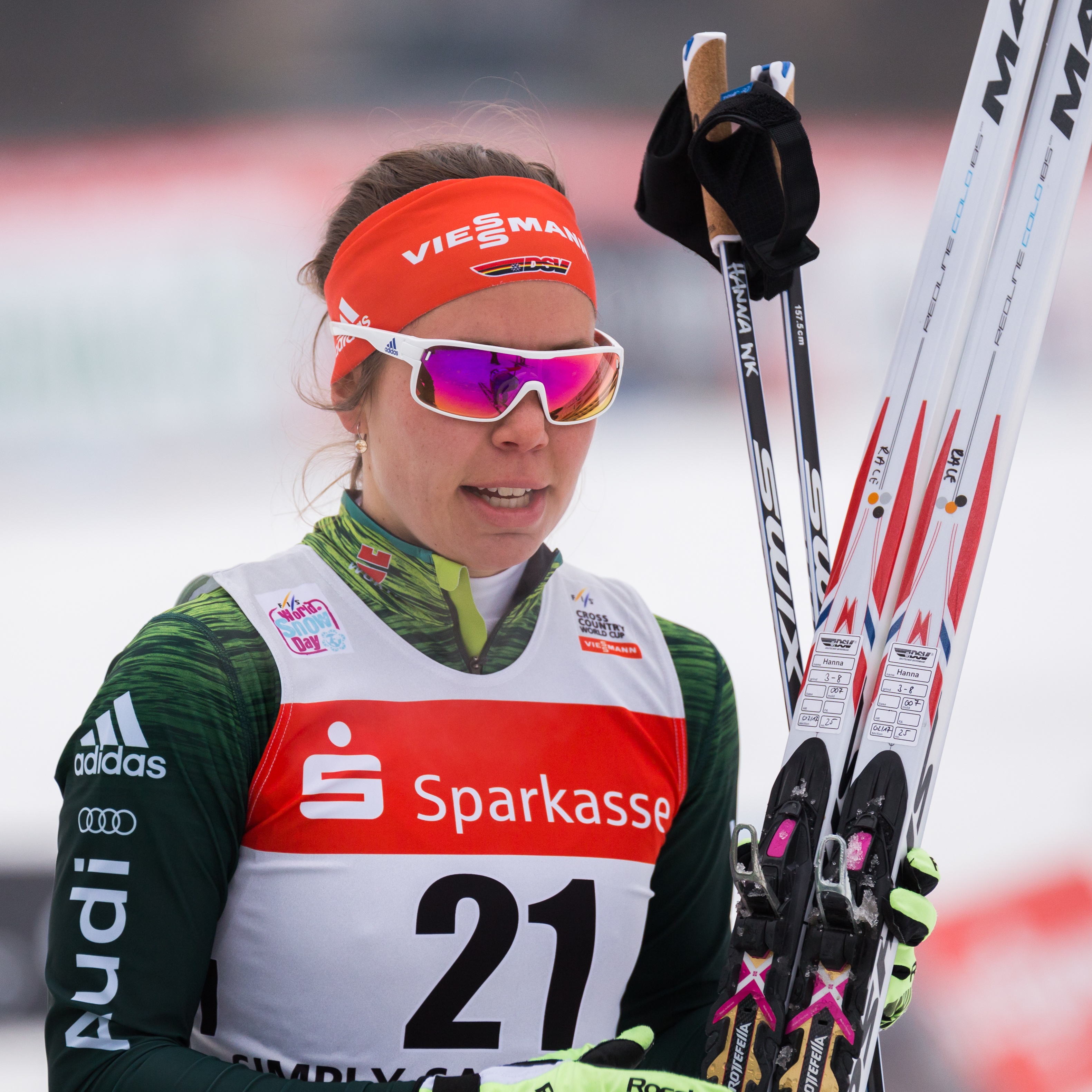 Hanna Kolb (GER, Deutschland)